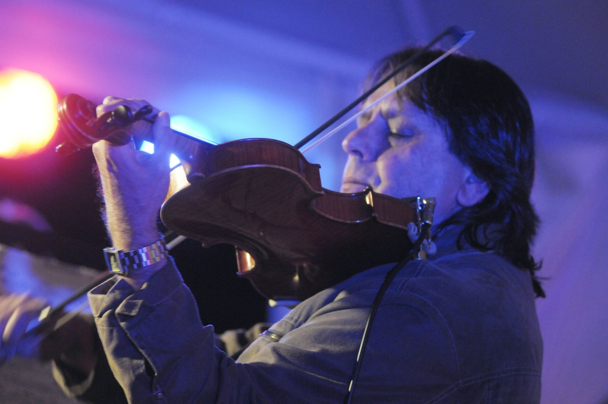 Zipflo Reinhard